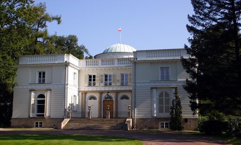 Warszawa (Polska)